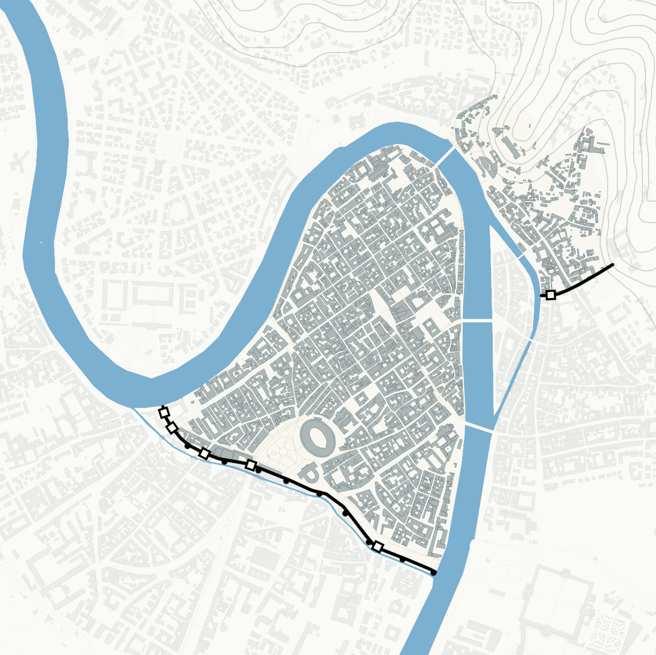 Planimetria della città di Verona con le mura e le porte urbiche principali. Vedi anche Le mura di Verona di Annamaria Conforti Calcagni.